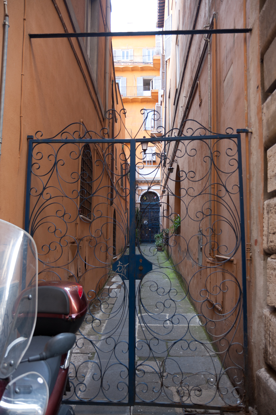 двор